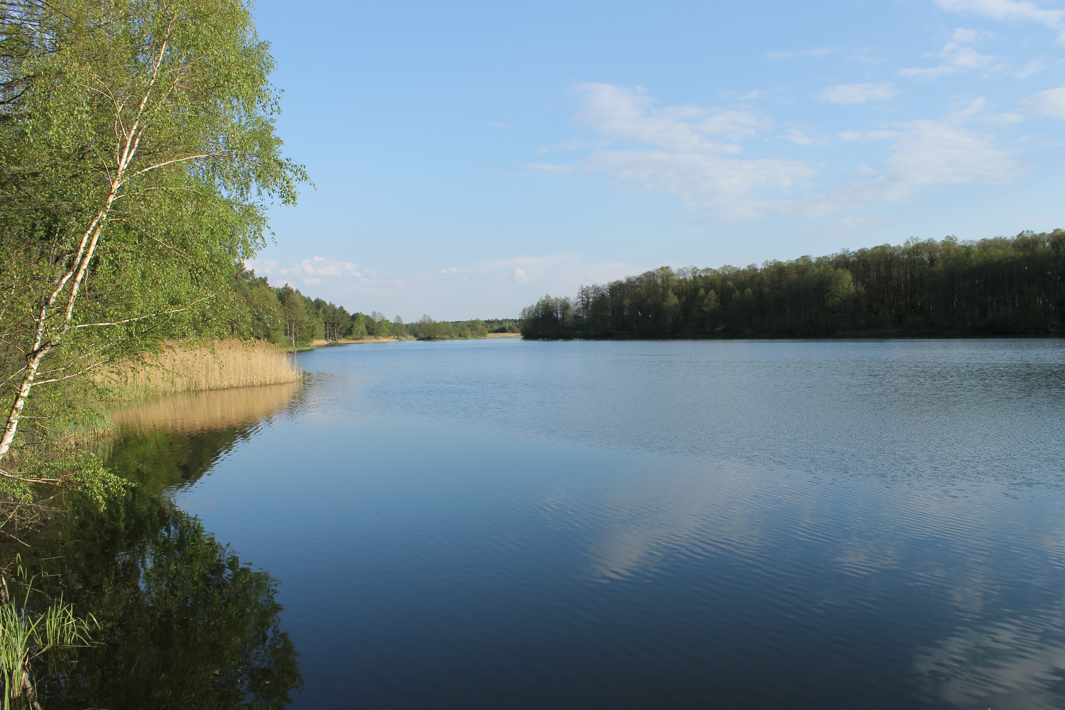 Заказник Голубі озера в Славутському районі